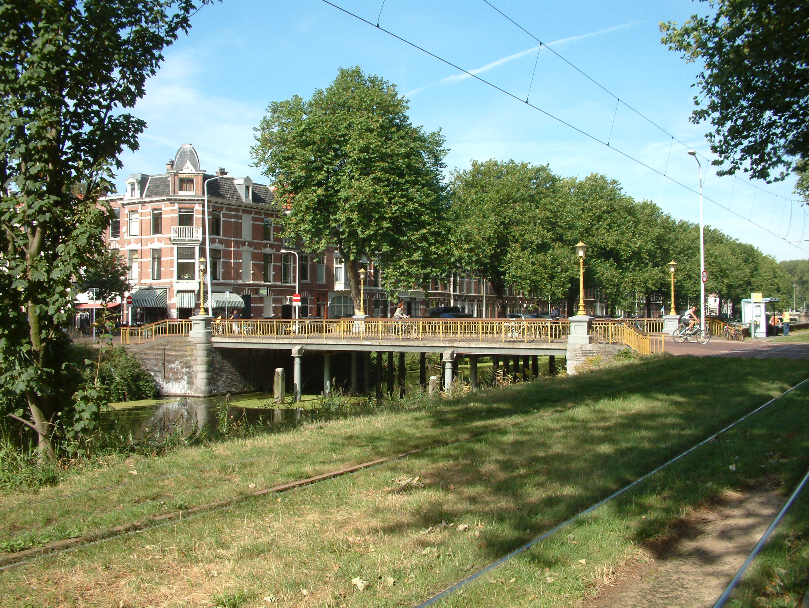 Brug in Den Haag